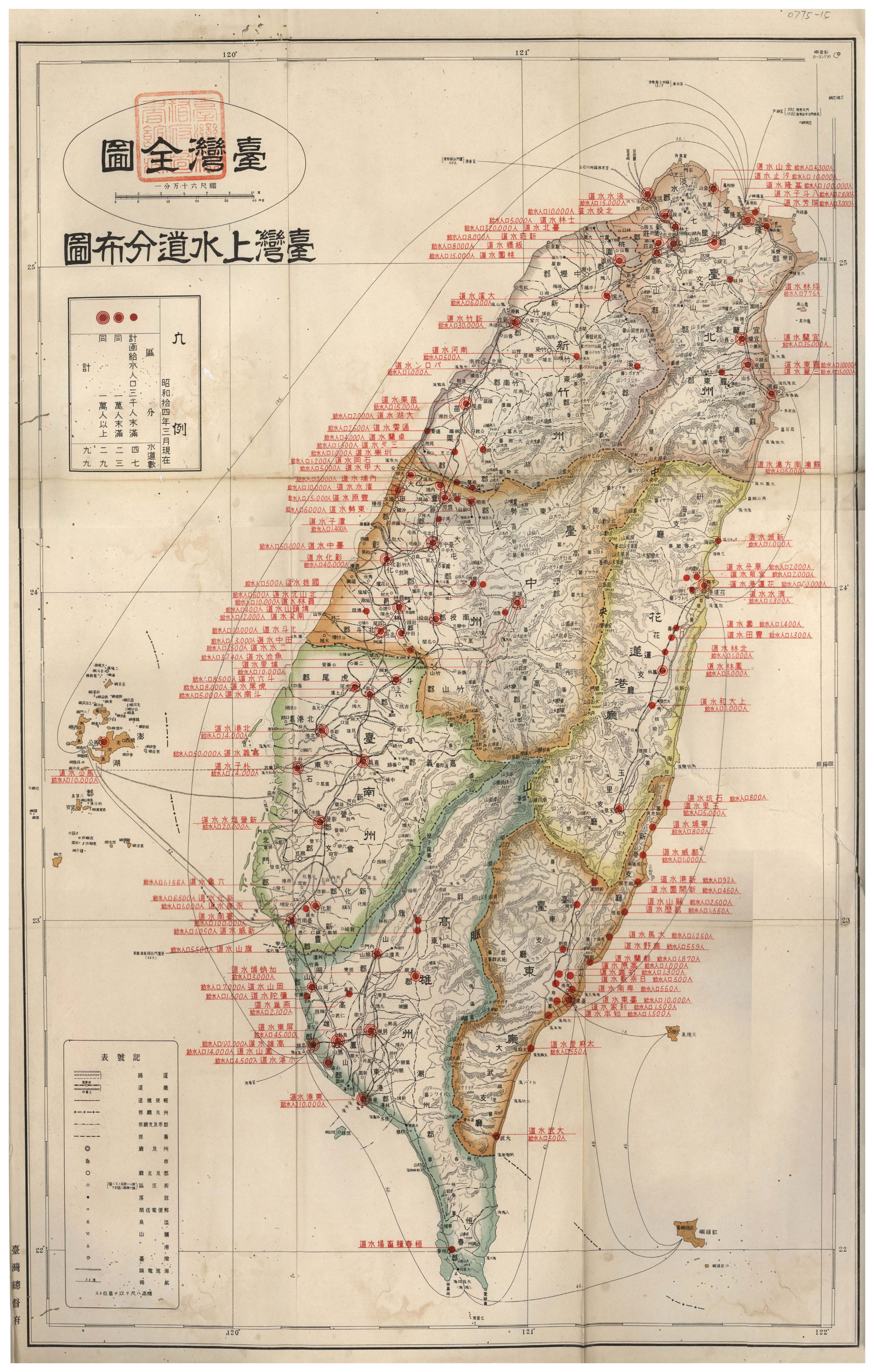 台灣上水道分布